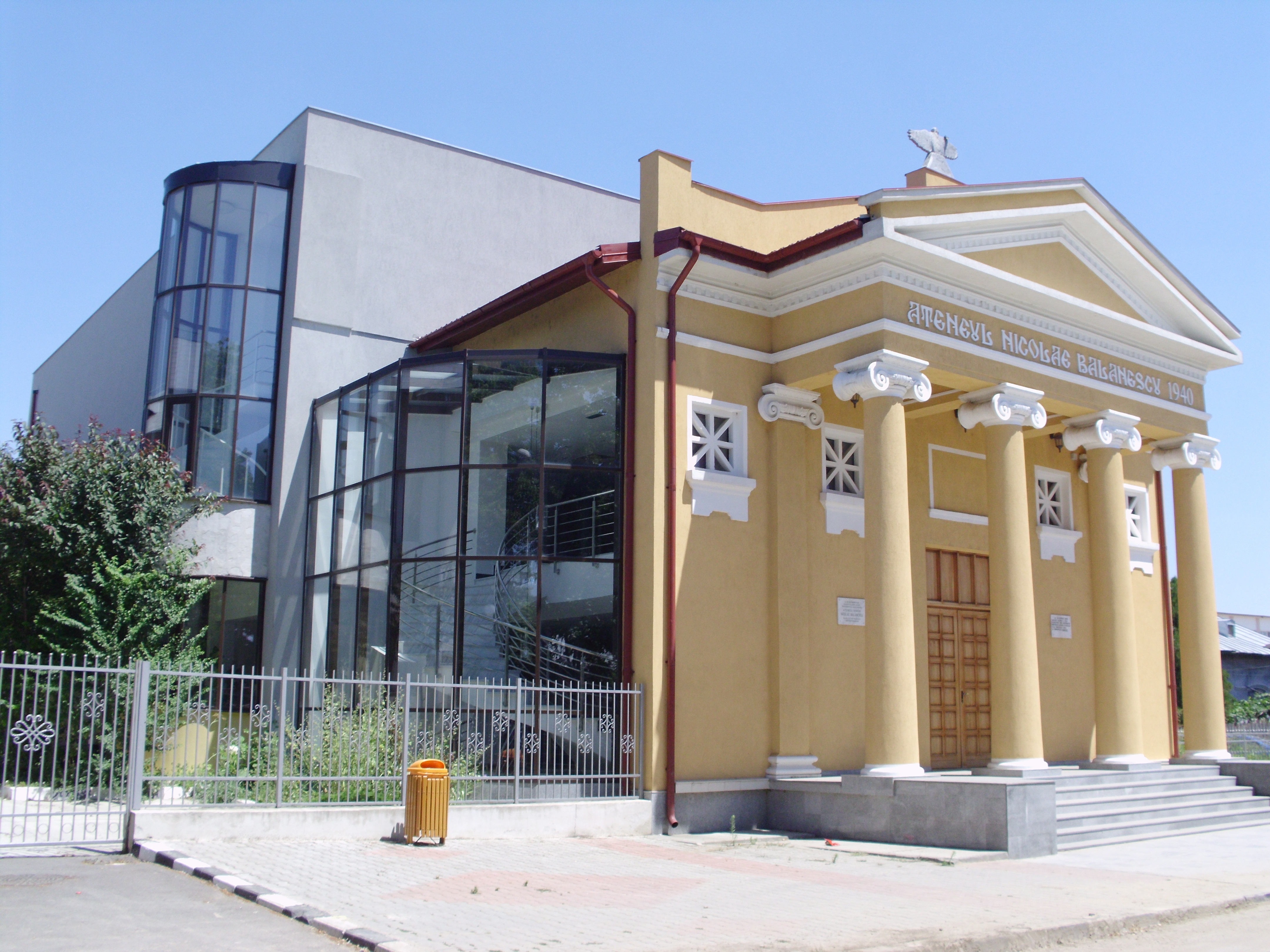 Ateneul "Nicolae Bălănescu" -fațada de sud cu porticul neoclasic cu trepte, de la intrarea principalășifațada de est cu porticul încorporat al fostei case Bălănescu